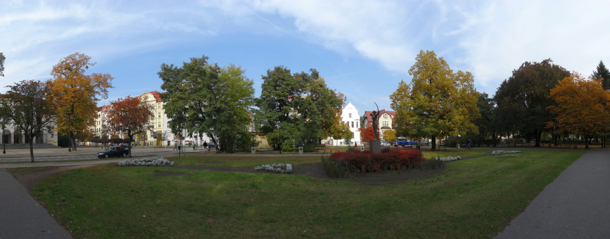 Park im. Jana Kochanowskiego w Bydgoszczy